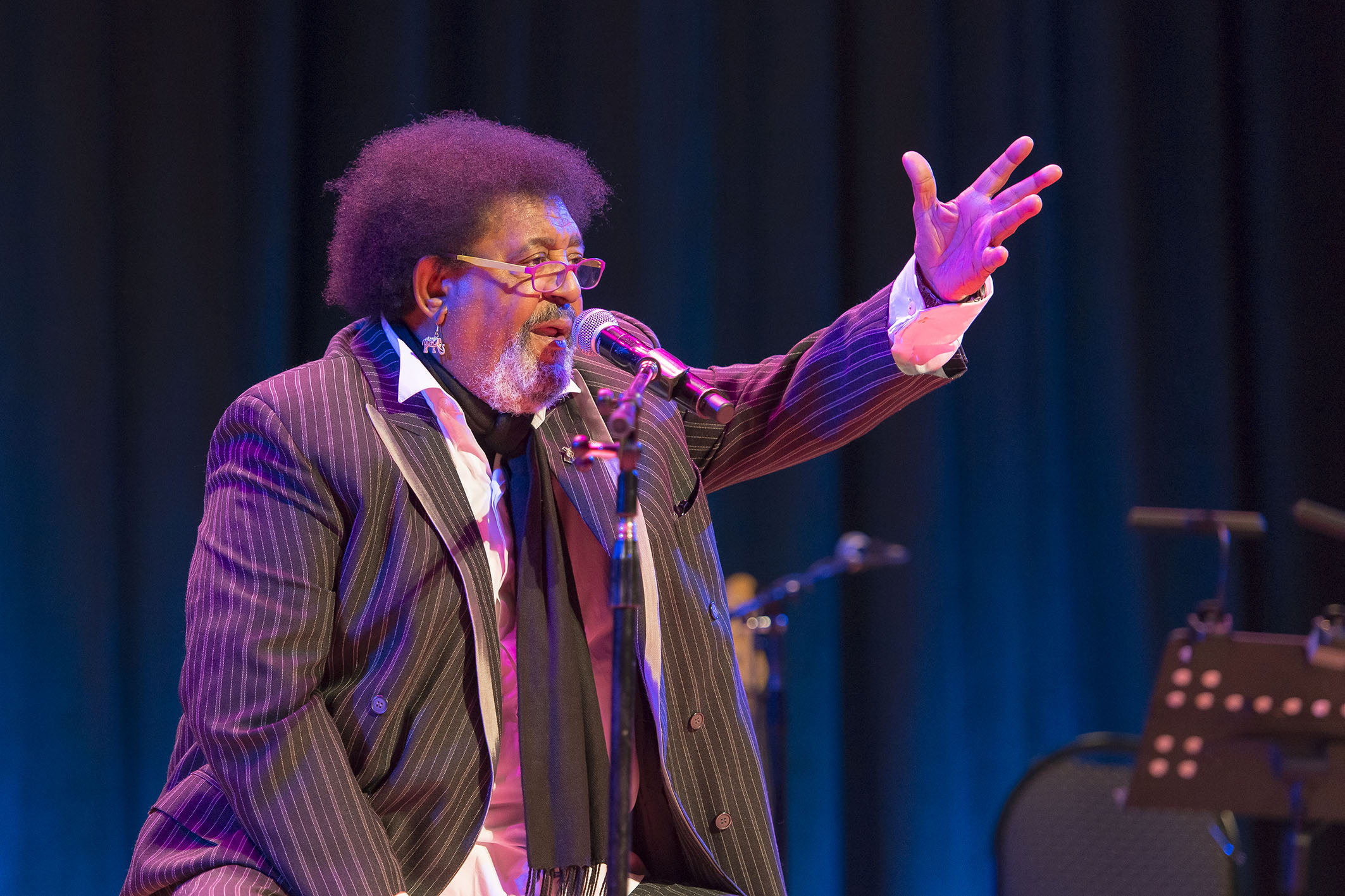 Buenos Aires, 23 de Agosto de 2015 - El cantante, compositor y músico uruguayo Rubén Rada presentó su disco “Tango, milonga y candombe” el domingo 23 de agosto en el auditorio La Ballena Azul del Centro Cultural Kirchner, como parte del ciclo Música del Sur.- Fotos: Manuel Pose Varela / CCK